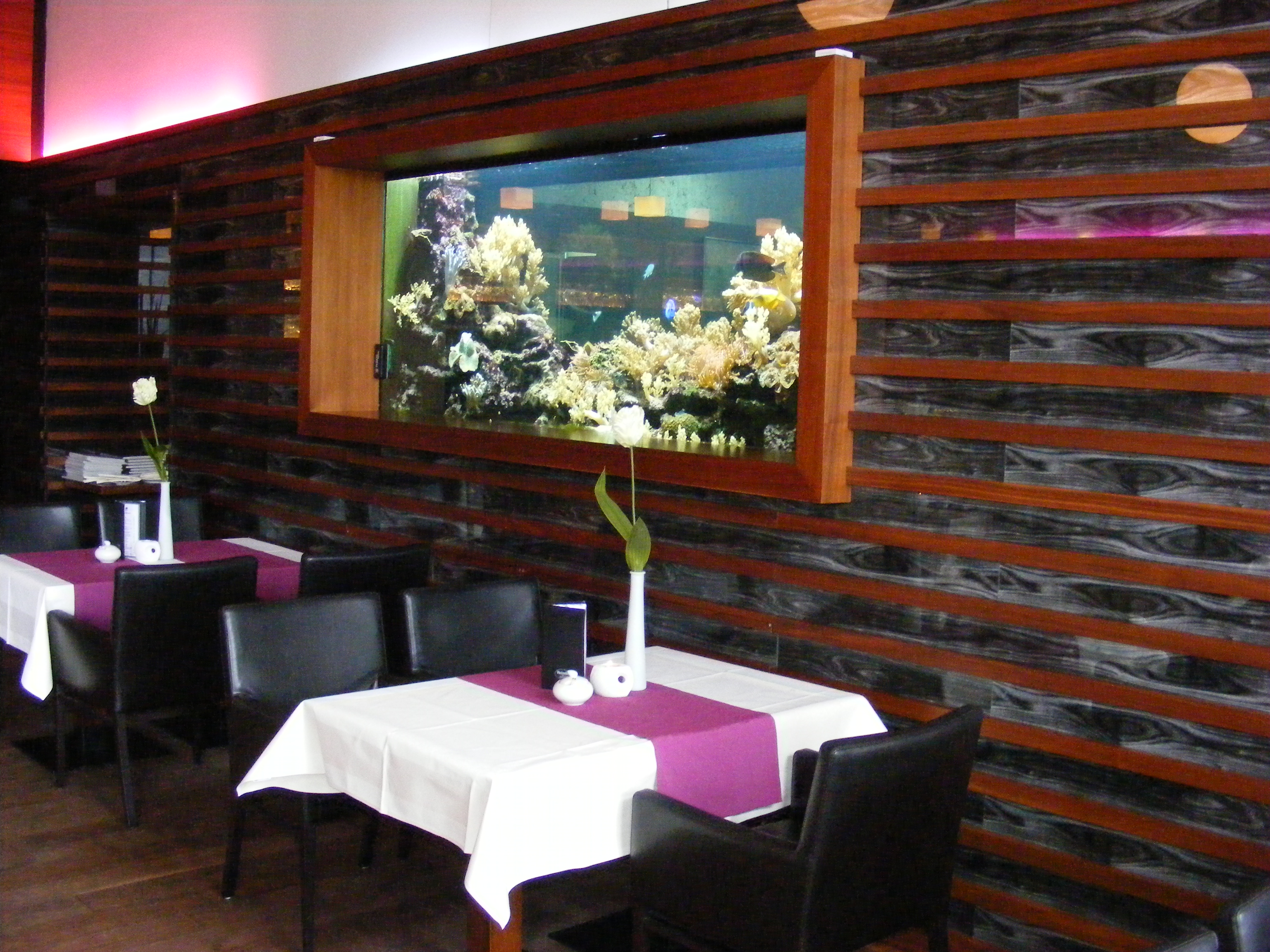 Bad Kissingen